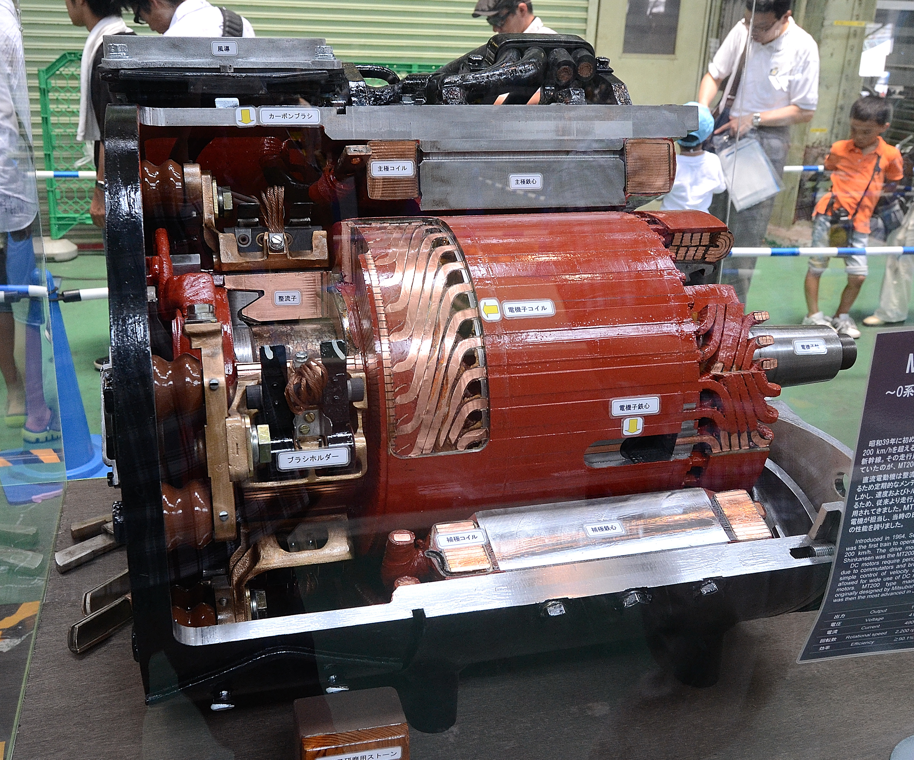 0系で使用されていたMT200形直流電動機（2014年、浜松工場で開催された新幹線なるほど発見デーにおいて撮影）。